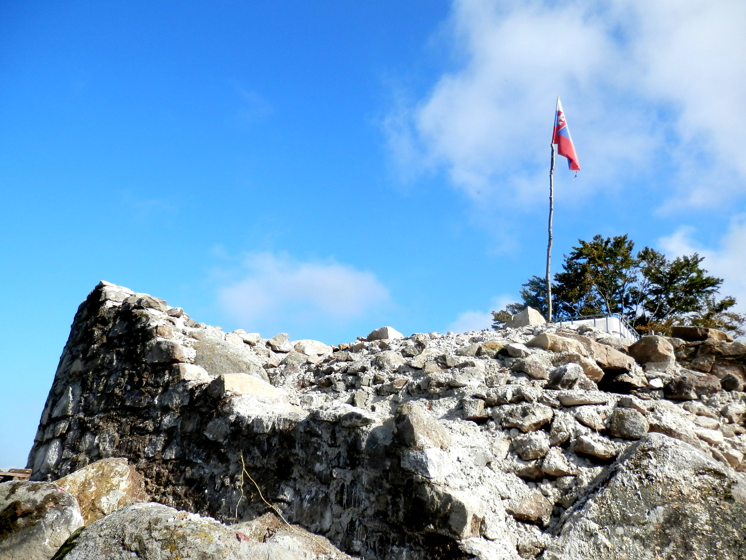 Pohľad na hrad Šebeš v čase jeho obnovy. Obec Podhradík.